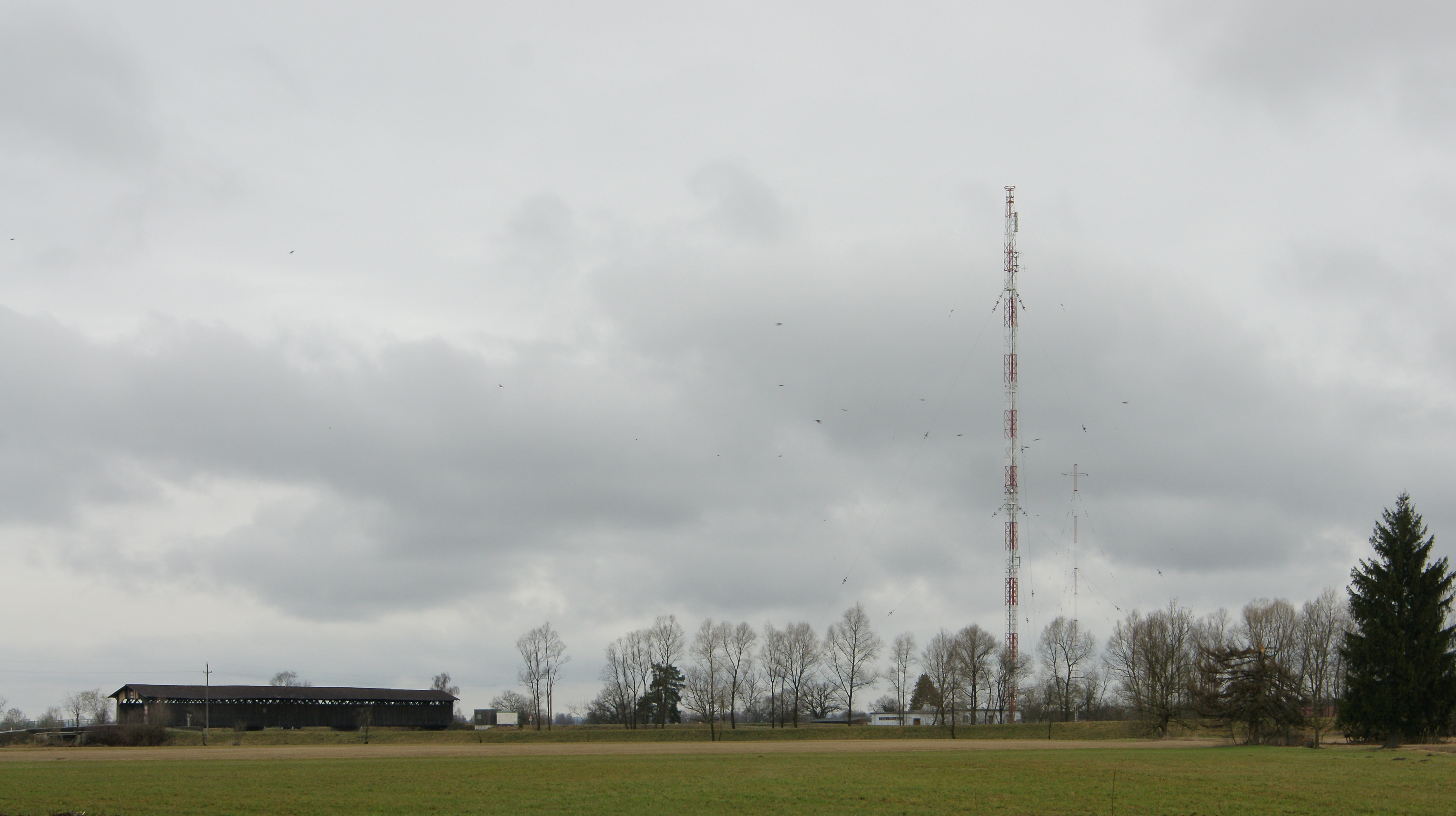 Der Sender Lauterach ist eine Einrichtung zur Verbreitung von UKW-Hörfunkprogrammen des ORF bei Lauterach in Vorarlberg. Die gedeckte Holzbrücke führt über die Dornbirner Ache. Die Senderbrücke steht unter Denkmalschutz.